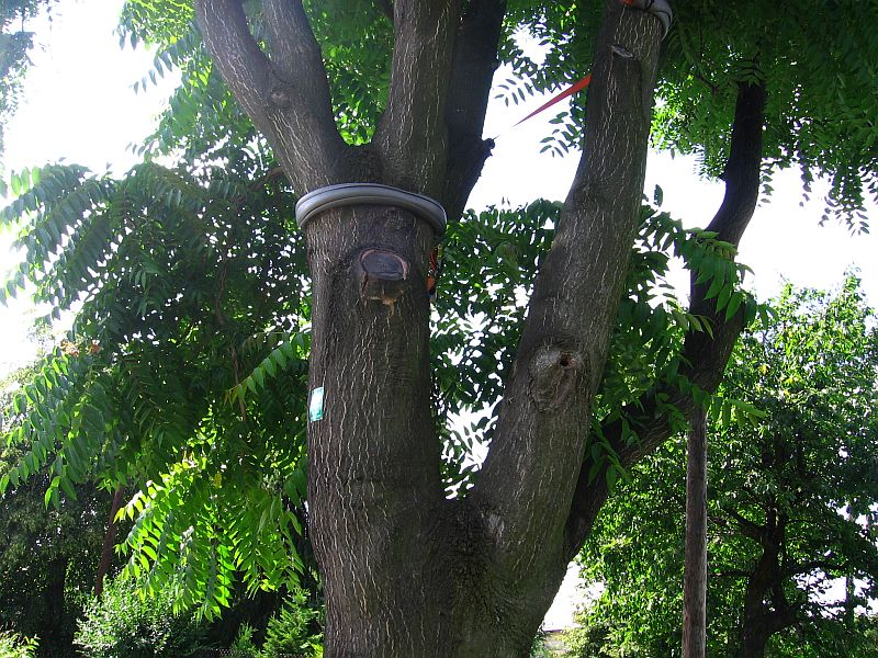 Bożodrzew w Sikorce